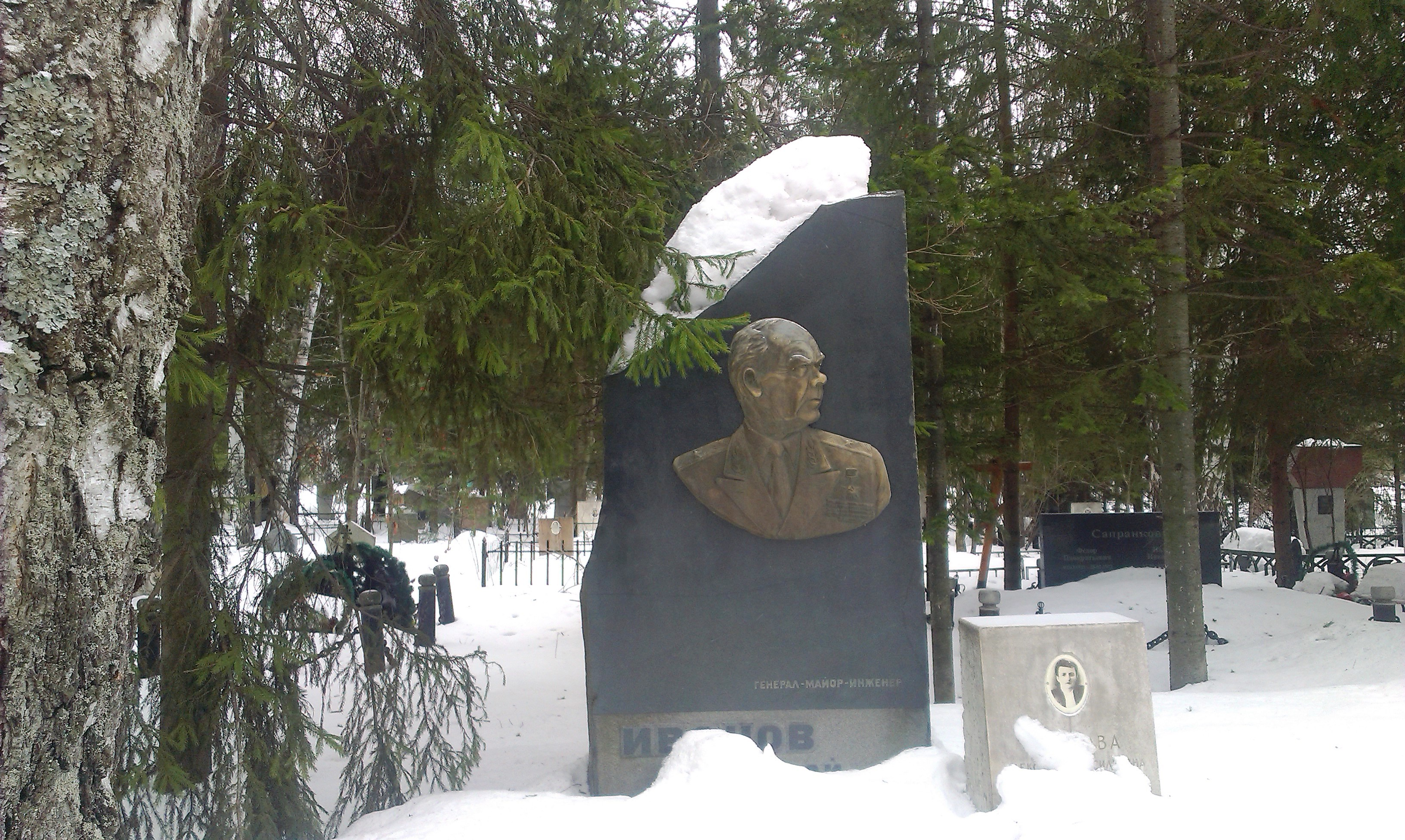 Южное кладбище в Новосибирске